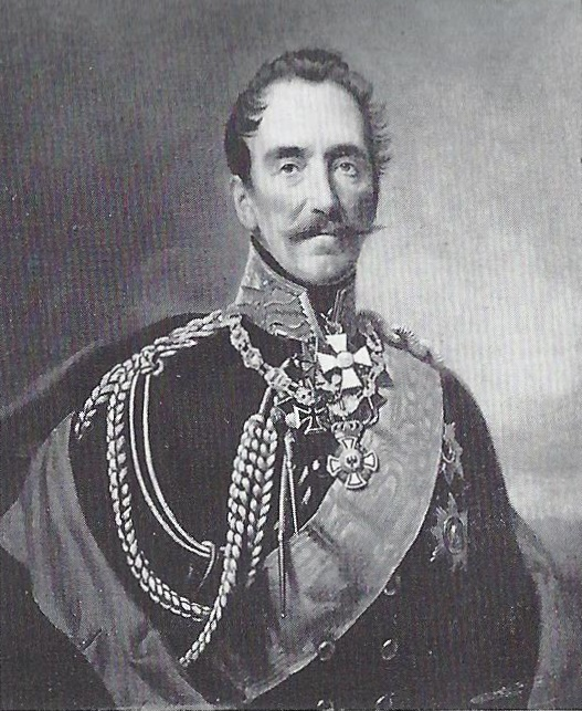 Gemälde von Graf Friedrich Emil Karl zu Dohna-Schlobitten (1784-1854)